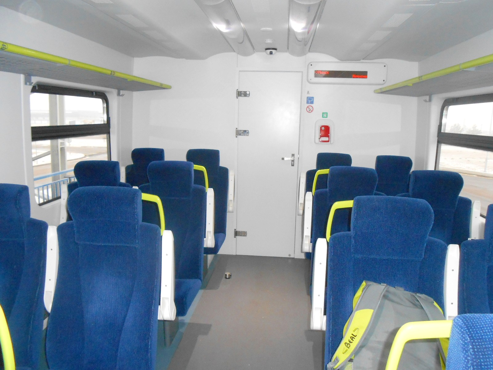 Салон дизель-поезда ДП3-001 (PESA 730M)